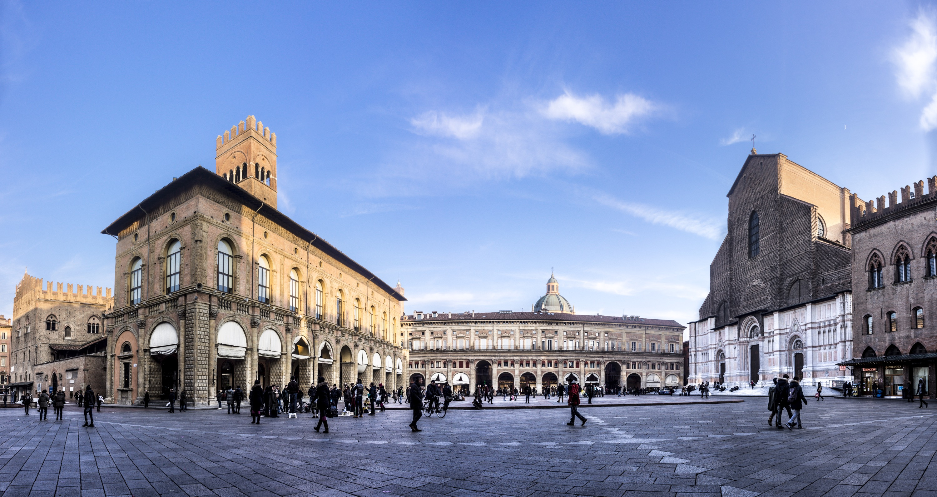 Piazza Maggiore This is a photo of a monument which is part of cultural heritage of Italy.